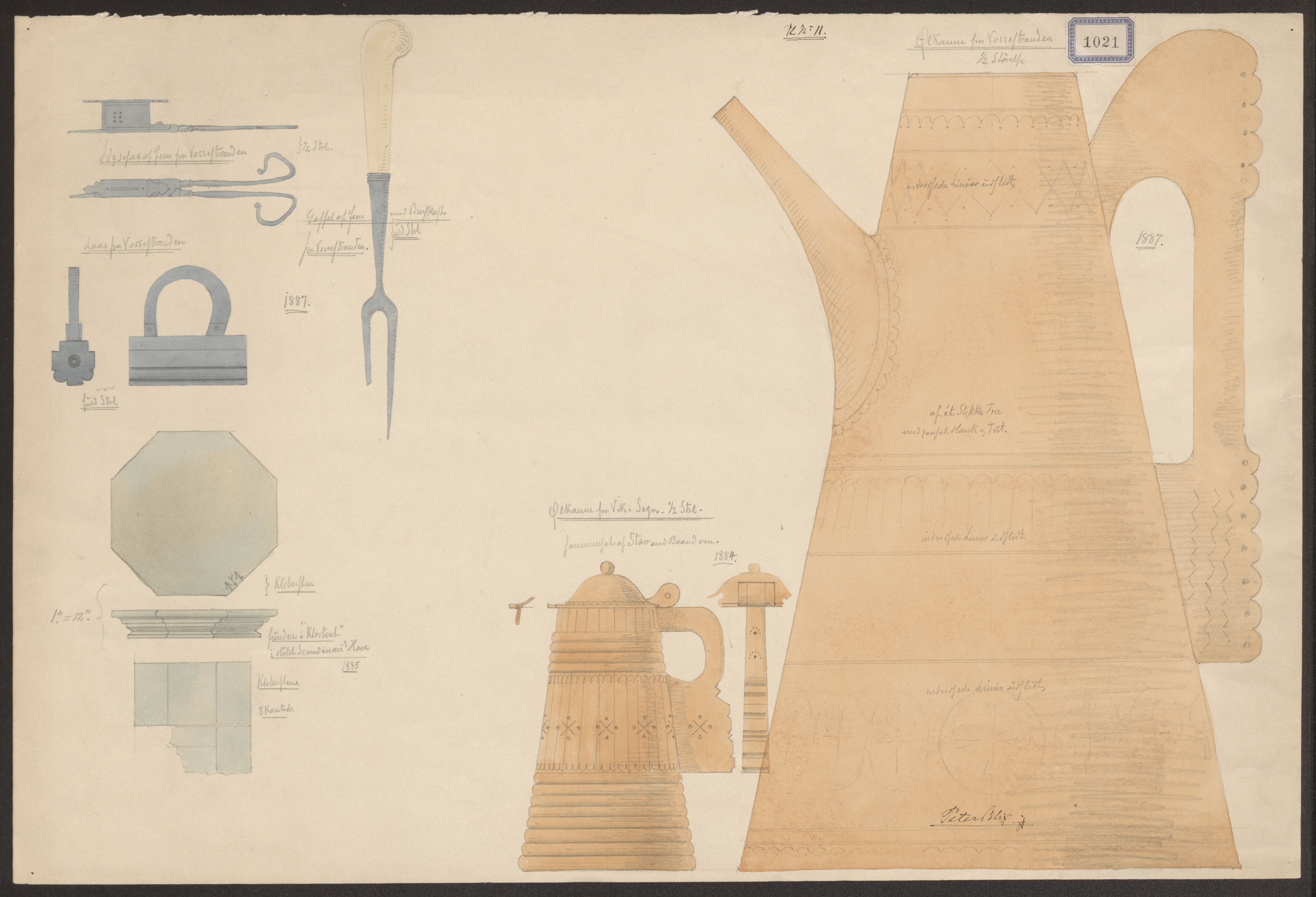 Bildet er hentet fra Riksantikvaren. "Lysesaks, gaffel, lås, ølkanne"" funnet i Hotel Scandinavie's _ have i Bergen""". FF nr 1021 Eier : Fortidsminneforeningen Sted : Norway, Hordaland, Voss Emneord: "KJØKKEN, INVENTAR" Medium : "Blyant;Akvarell"